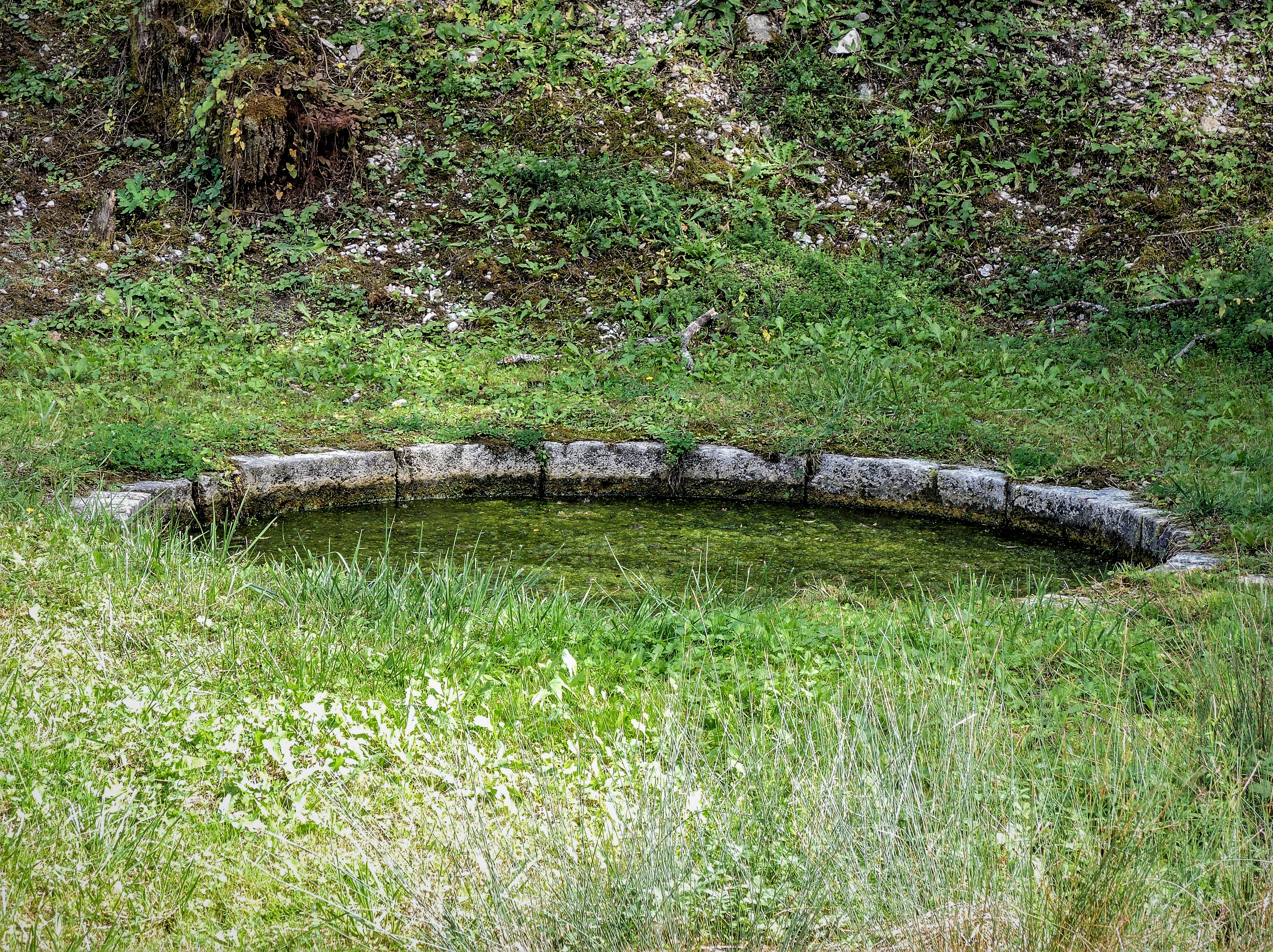 Le puits salé, au hameau de la Saulnerie. Soulce-Cernay. Doubs